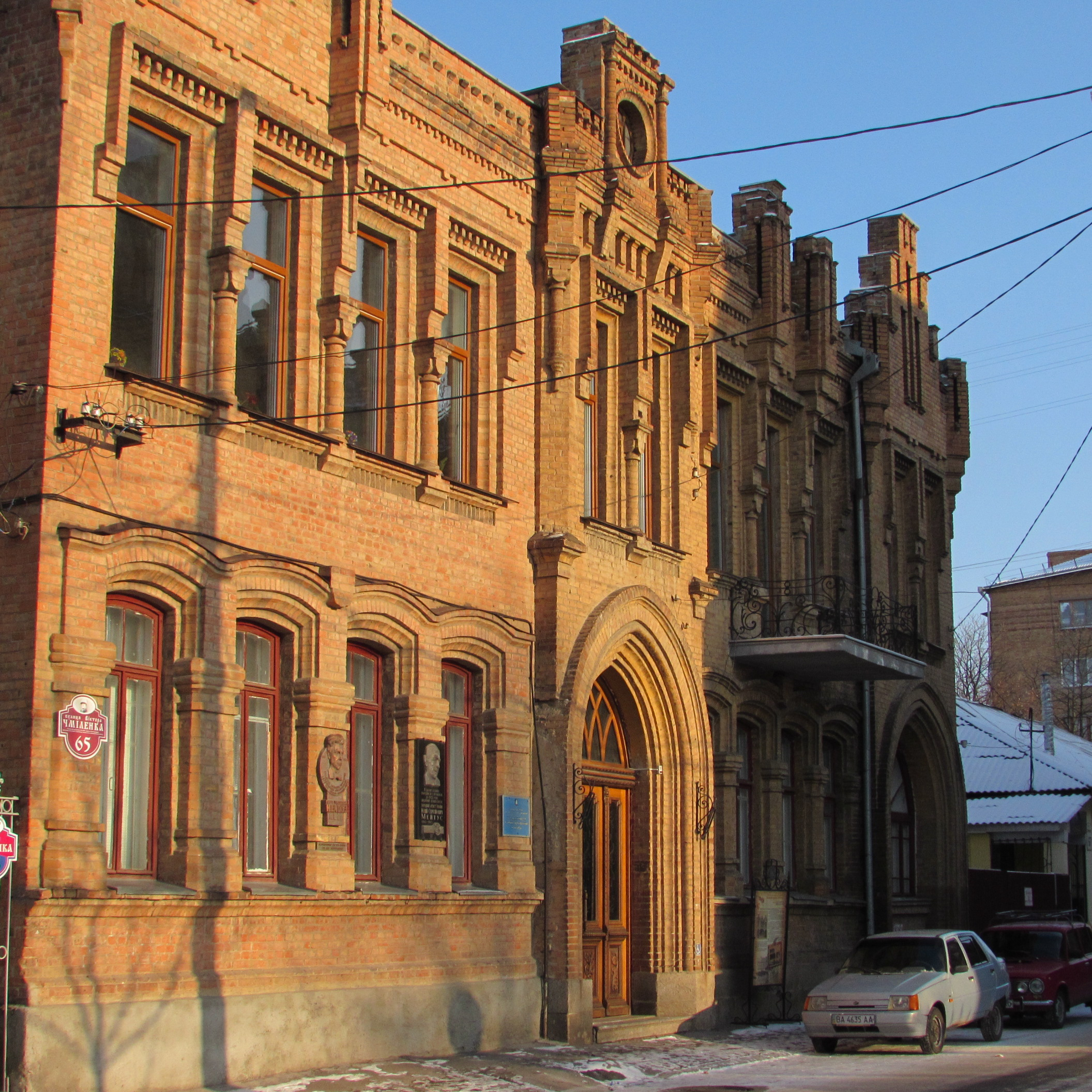 Будинок Мейтуса, Кропивницький, вул. В. Чміленка, 65